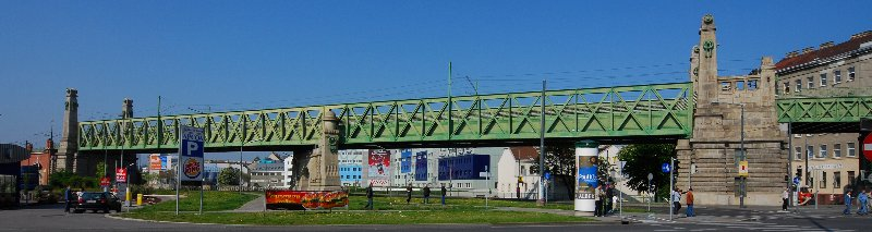 Die Brücke über die Zeile, auch genannt Brücke über die Gumpendorfer Zeile, Wientalbrücke oder Otto-Wagner-Brücke, erbaut für die Wiener Stadtbahn